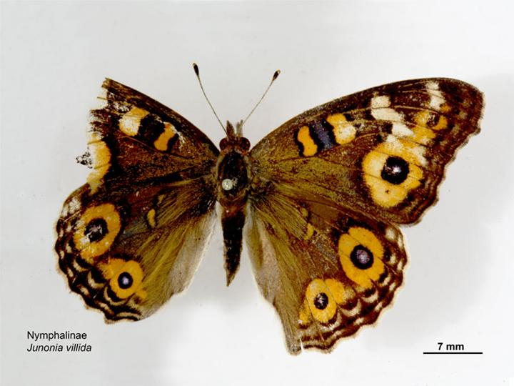 Junonia villida, dorsal view.